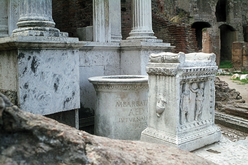 Bron van Iuturna (Lacus Iuturnae). Aedicula. Marmeren altaar met een afbeelding van Turnus en Iuturna. Foto uit 1976. Foto: Esko Koskimies